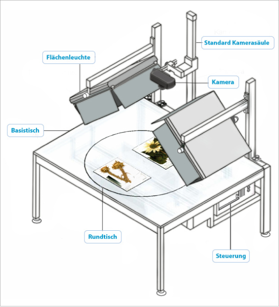 Herbar Digital base table